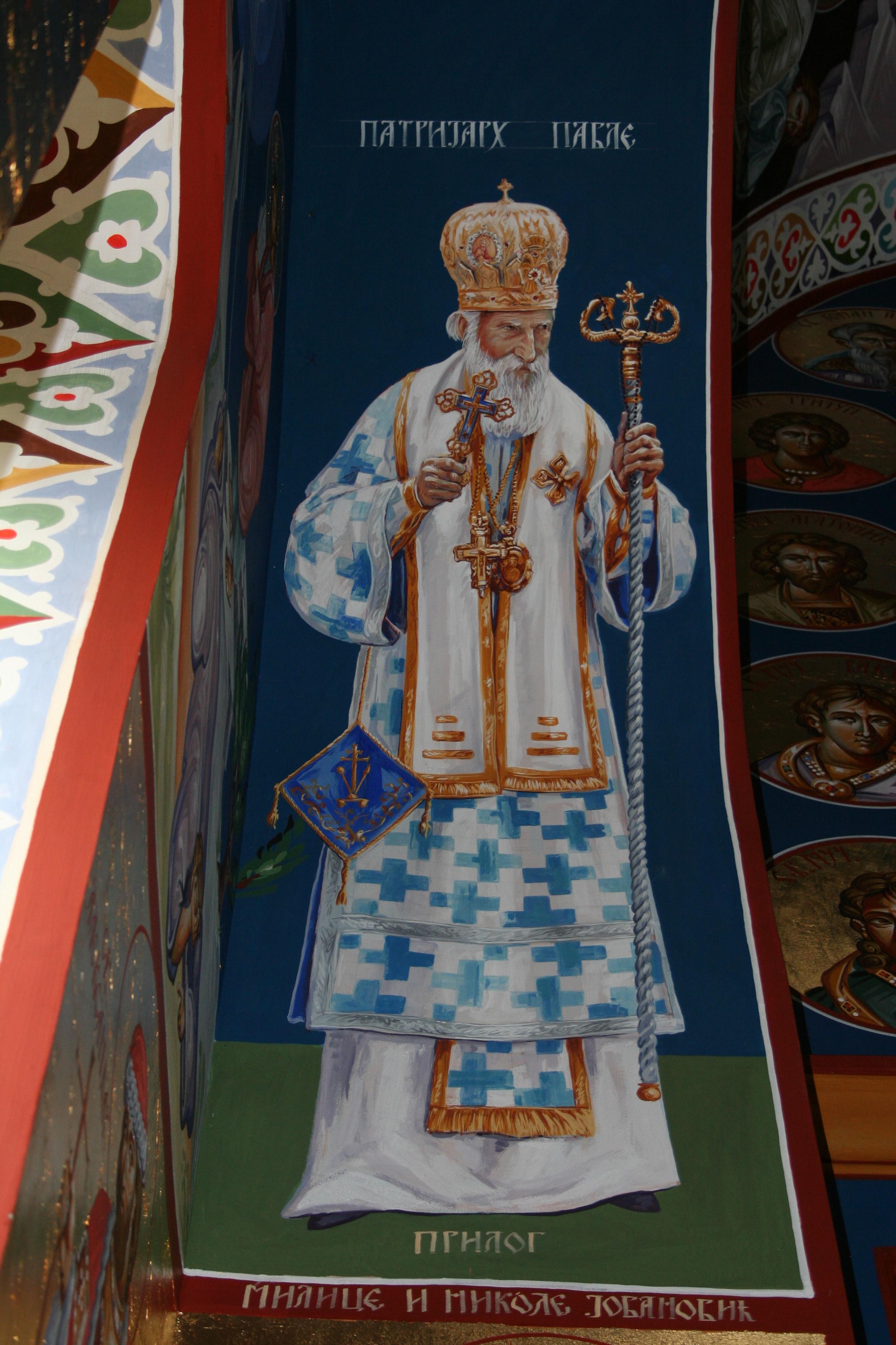 Crkva Svete Trojice u Zasavici II.